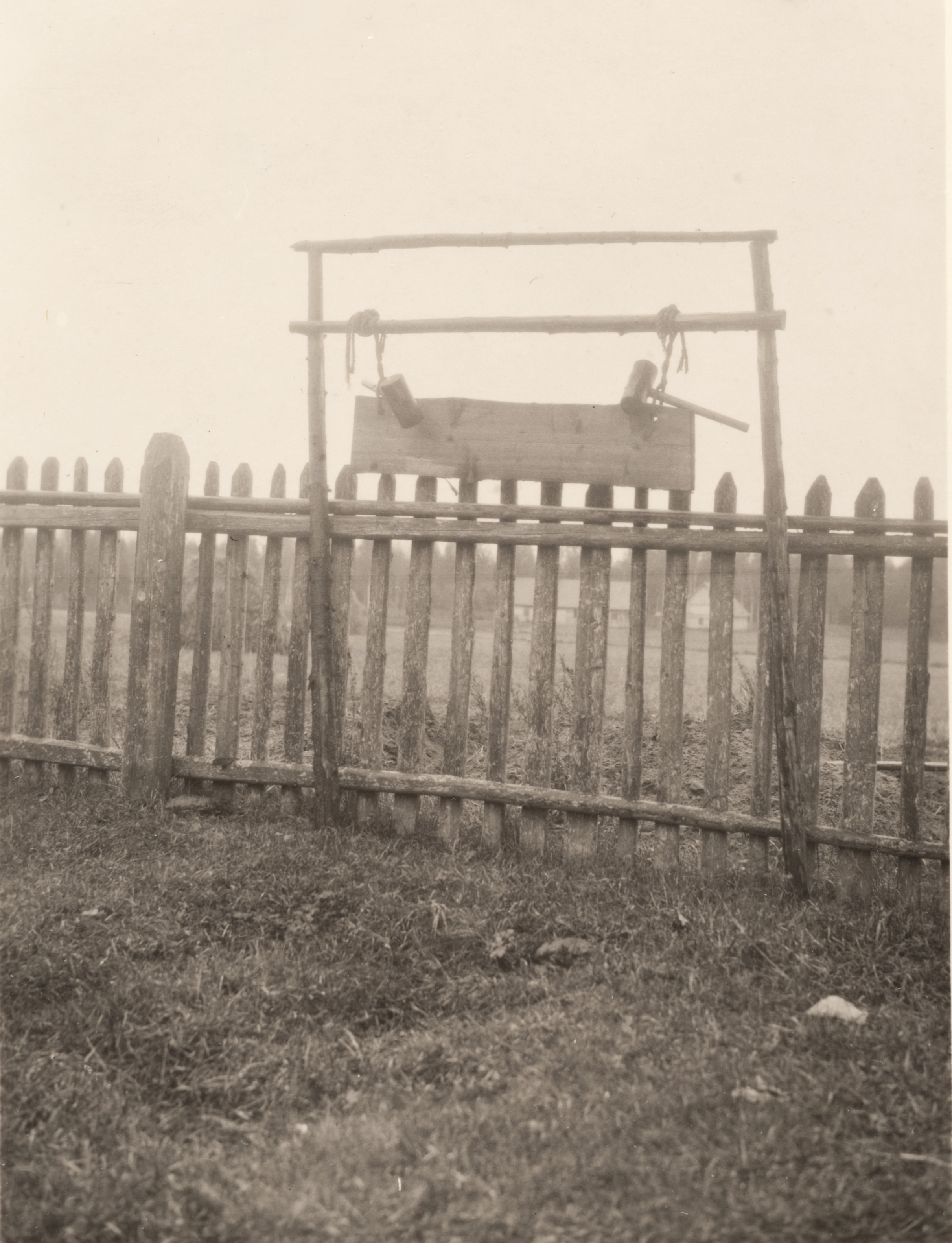 Lokulaud tehtud 1929/30 a talvel vallavalitsuse käsul tulekahjust teatamiseks, Siimu - Nelka talu K. - Jaani khk